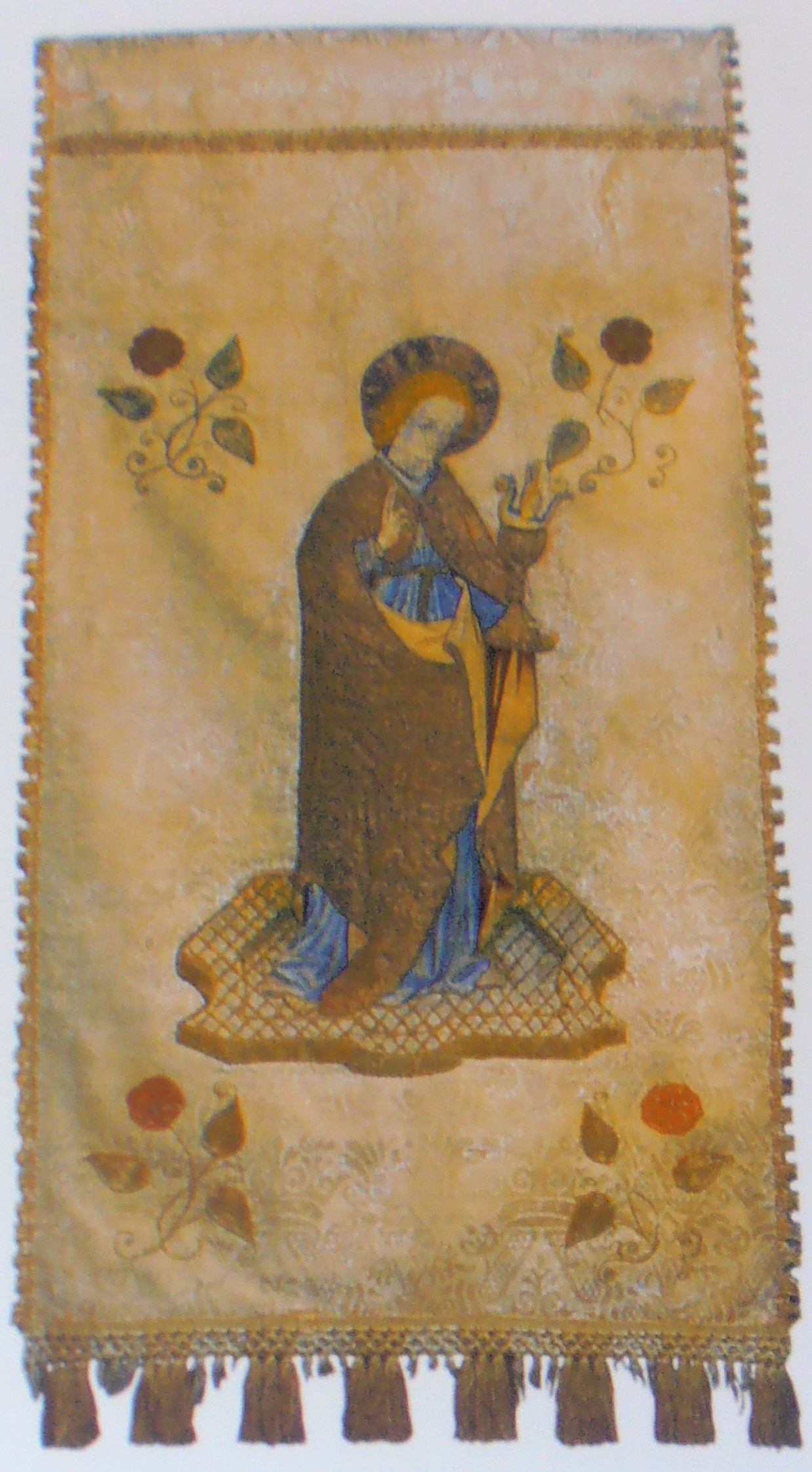 Drap de faristol amb sant Joan Evangelista a Patmos